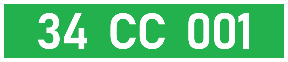 نمونه پلاک ترکیه